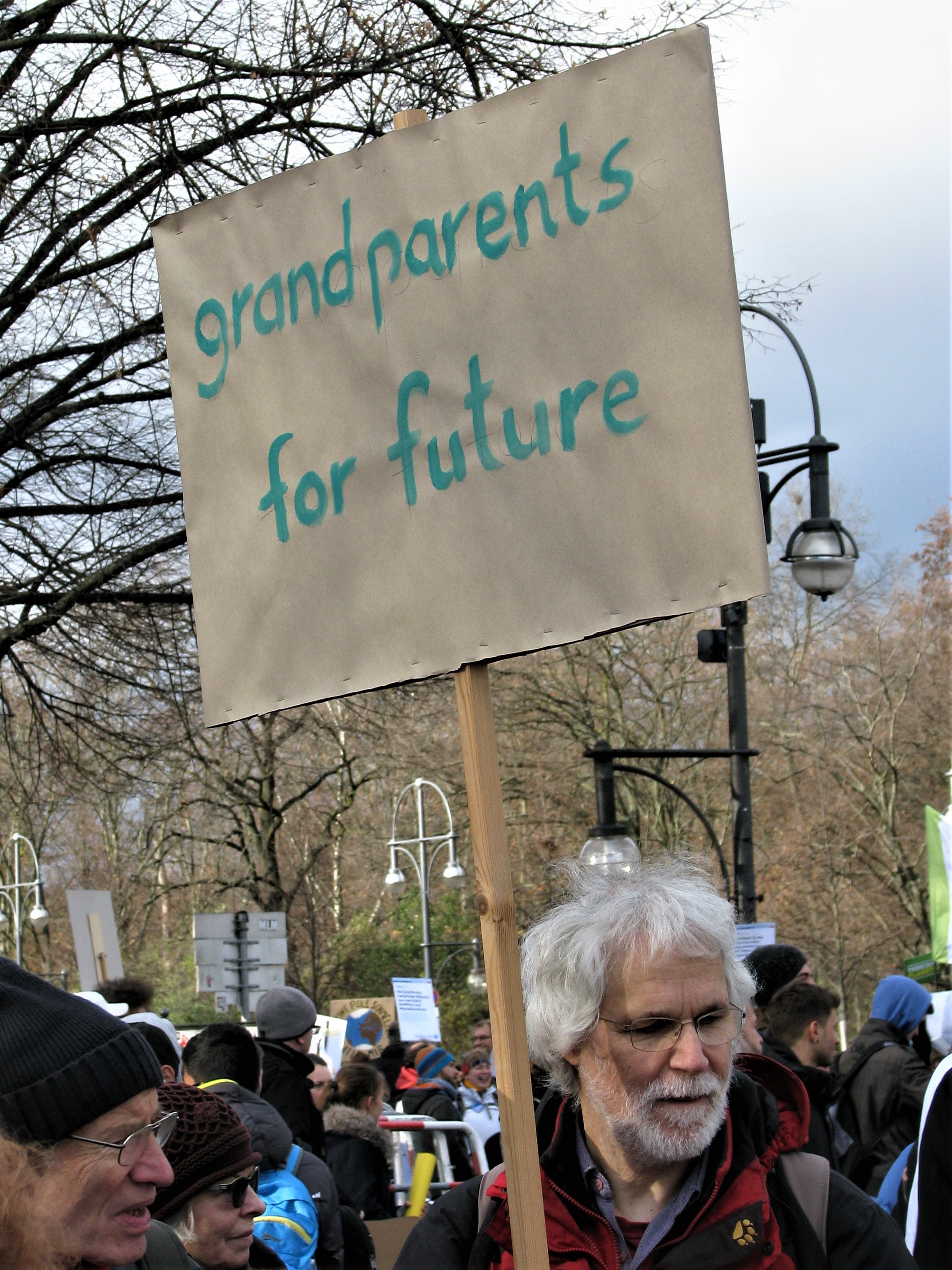 grandparents for future, Berlin, 29.11.2019 bei der Klimaschutzdemostration am Brandenburger Tor